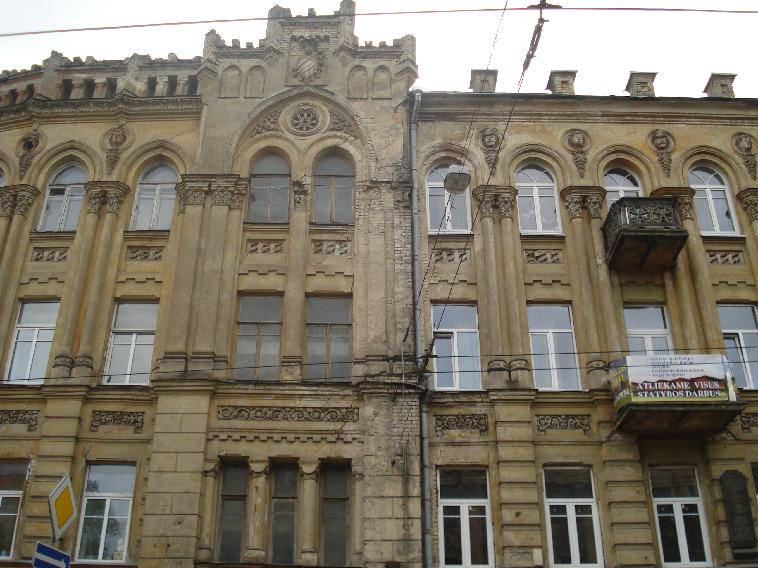 Jono Basanavičiaus gatvė 16 in Vilnius